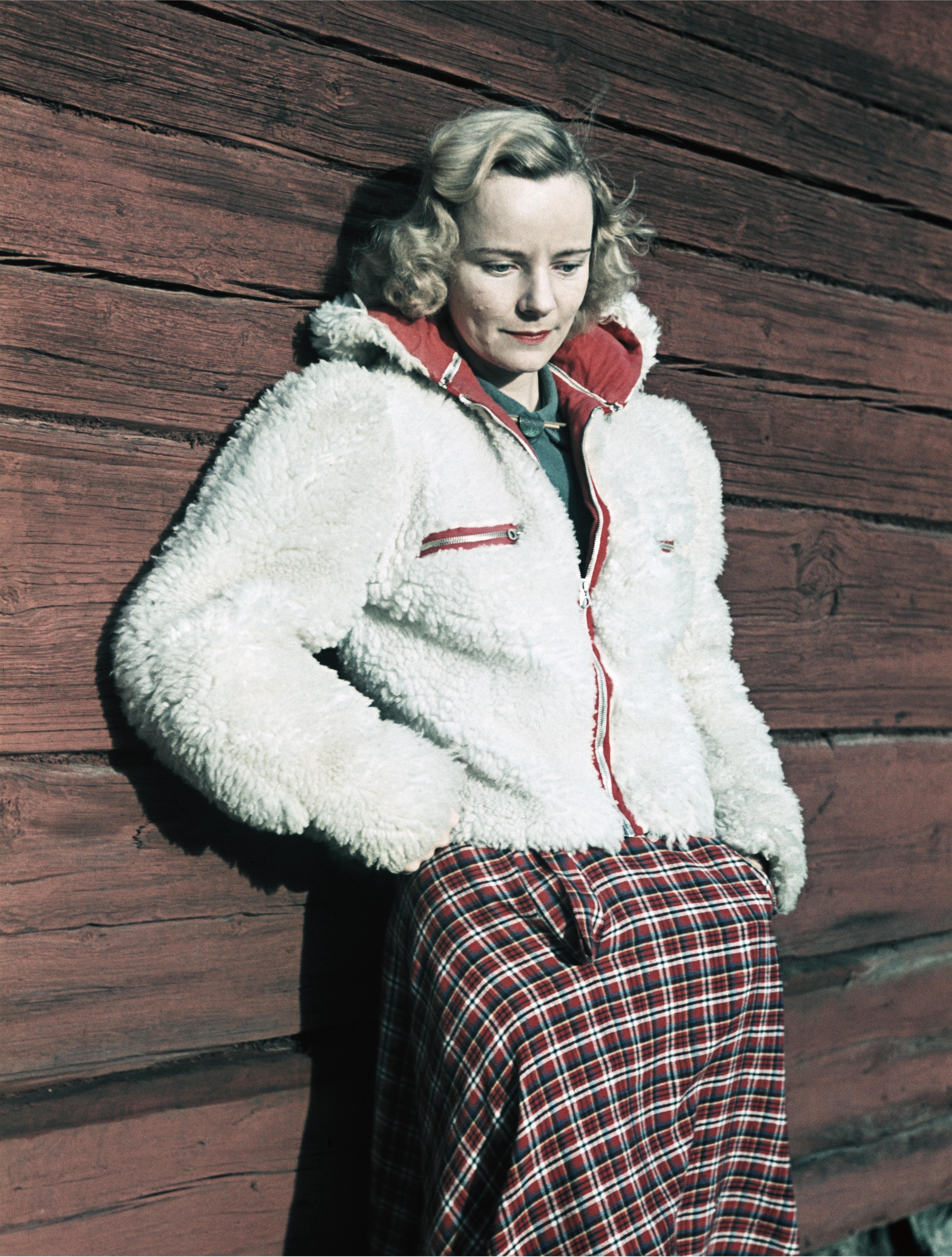 Klädd för friluftsliv. Blond kvinna i vit fuskpälsjacka och rutig kjol vid rödmålad timmervägg. Ämnesord: Kläder : Damkläder, Kläder : Ytterkläder, Kvinna, Mode, Motivkategori : Porträtt.